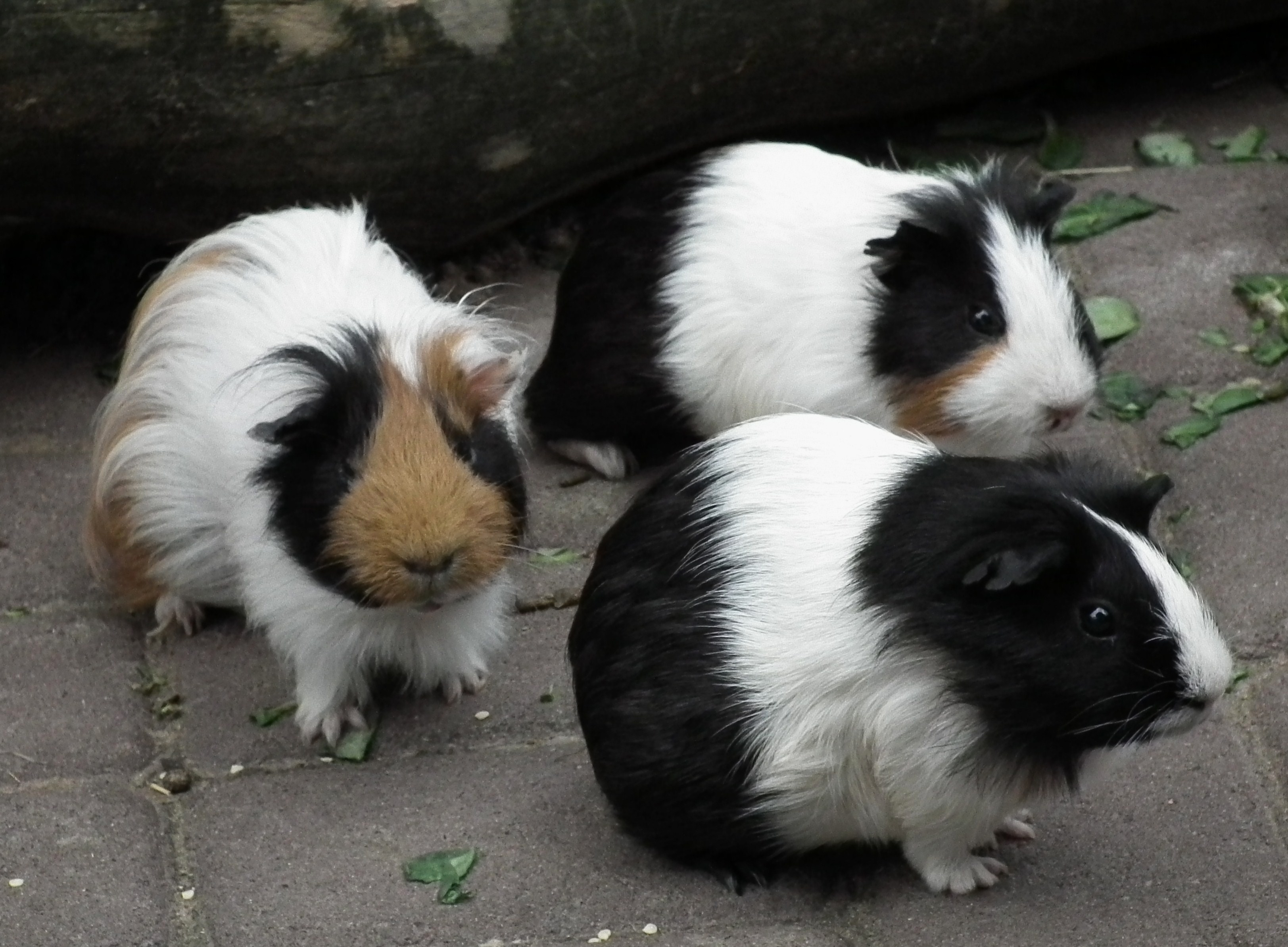 Drei Hausmeerschweinchen (Cavia porcellus).